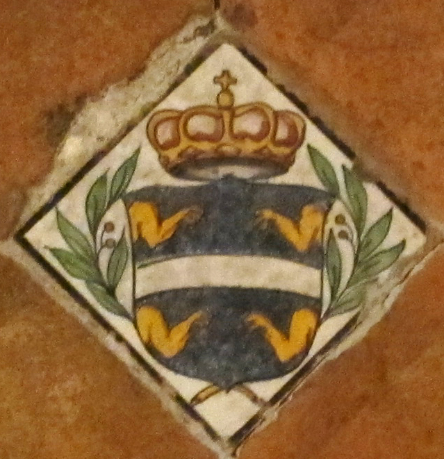 Roma, palazzo Brancaccio, stemma dei Brancaccio detti "del Cardinale"